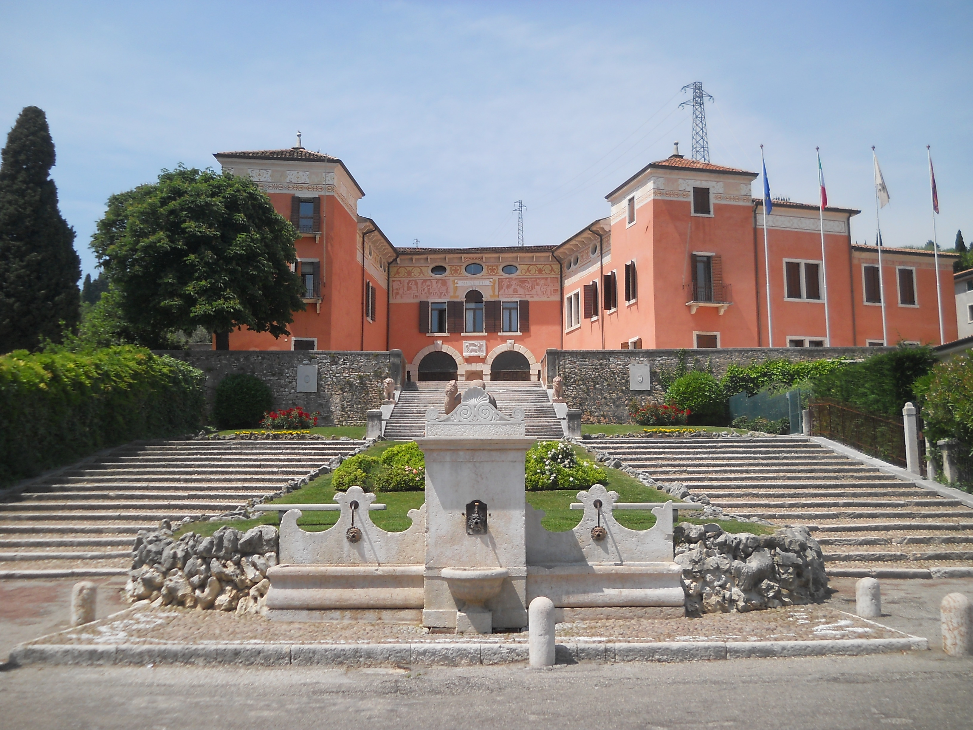 Edificio che ospita la sede del Comune di Sant'Ambrogio di Valpolicella